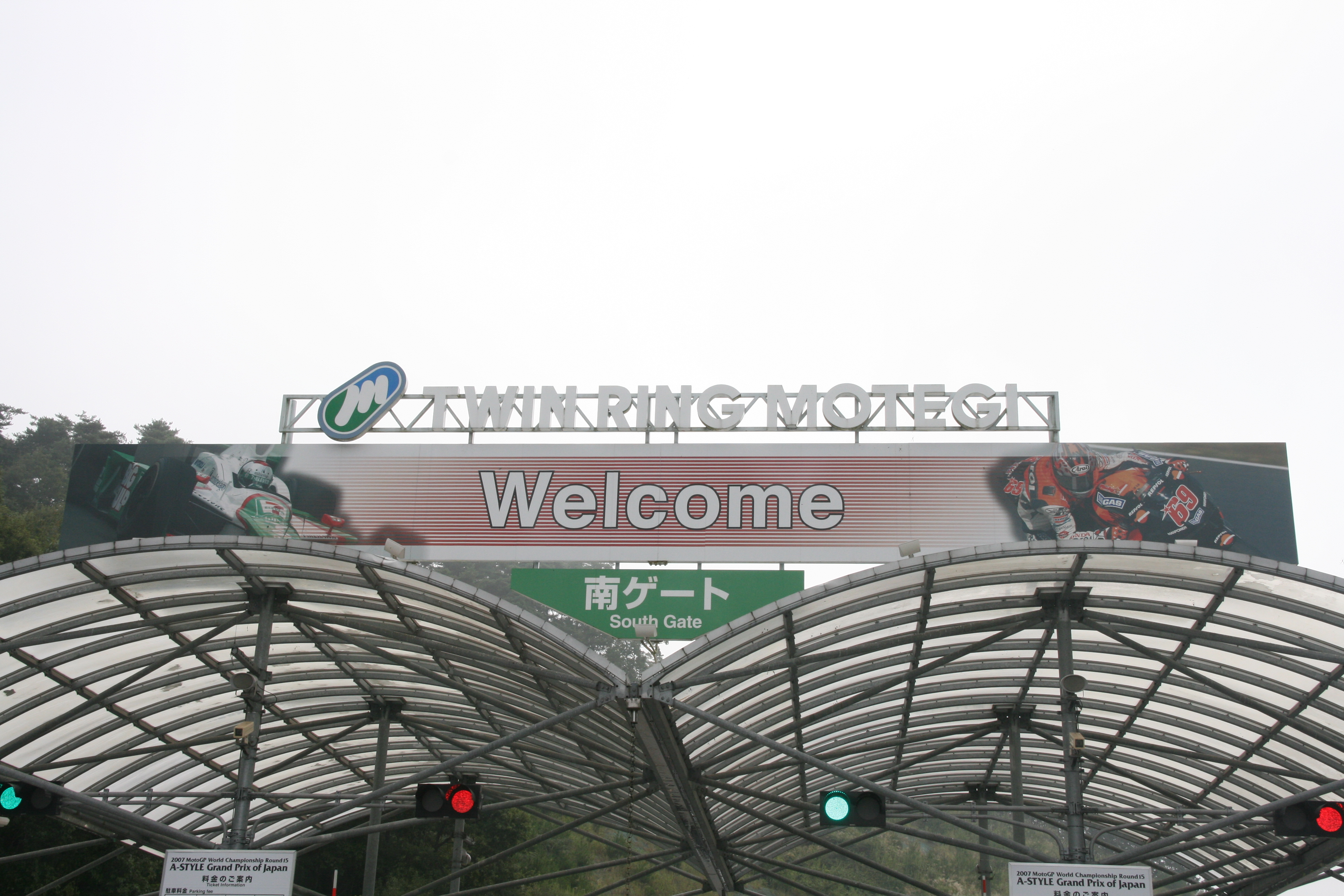 South Gate of Twin_Ring_Motegi ツインリンクもてぎの南ゲート